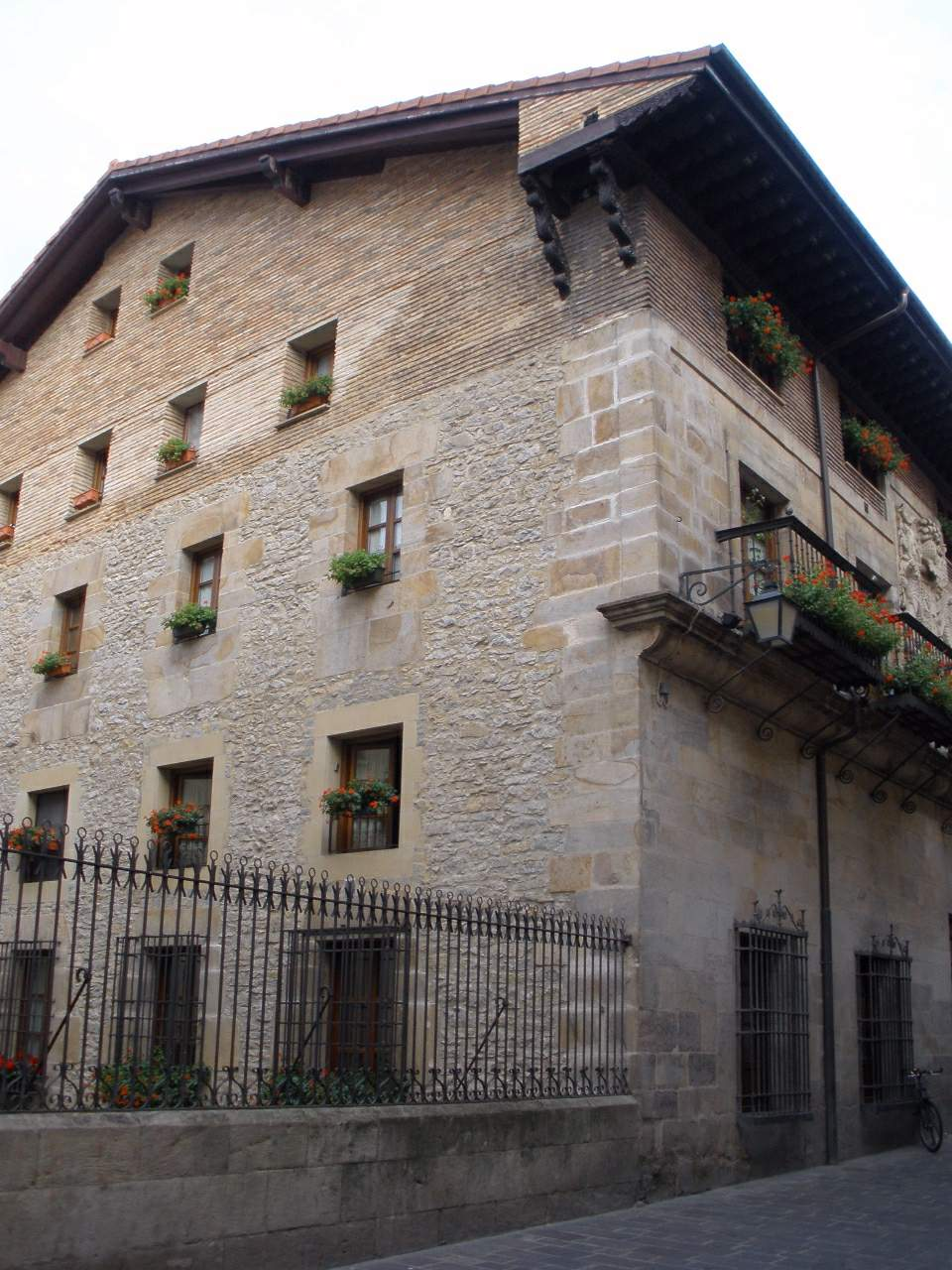 Calle Pintorería, Vitoria-Gasteiz